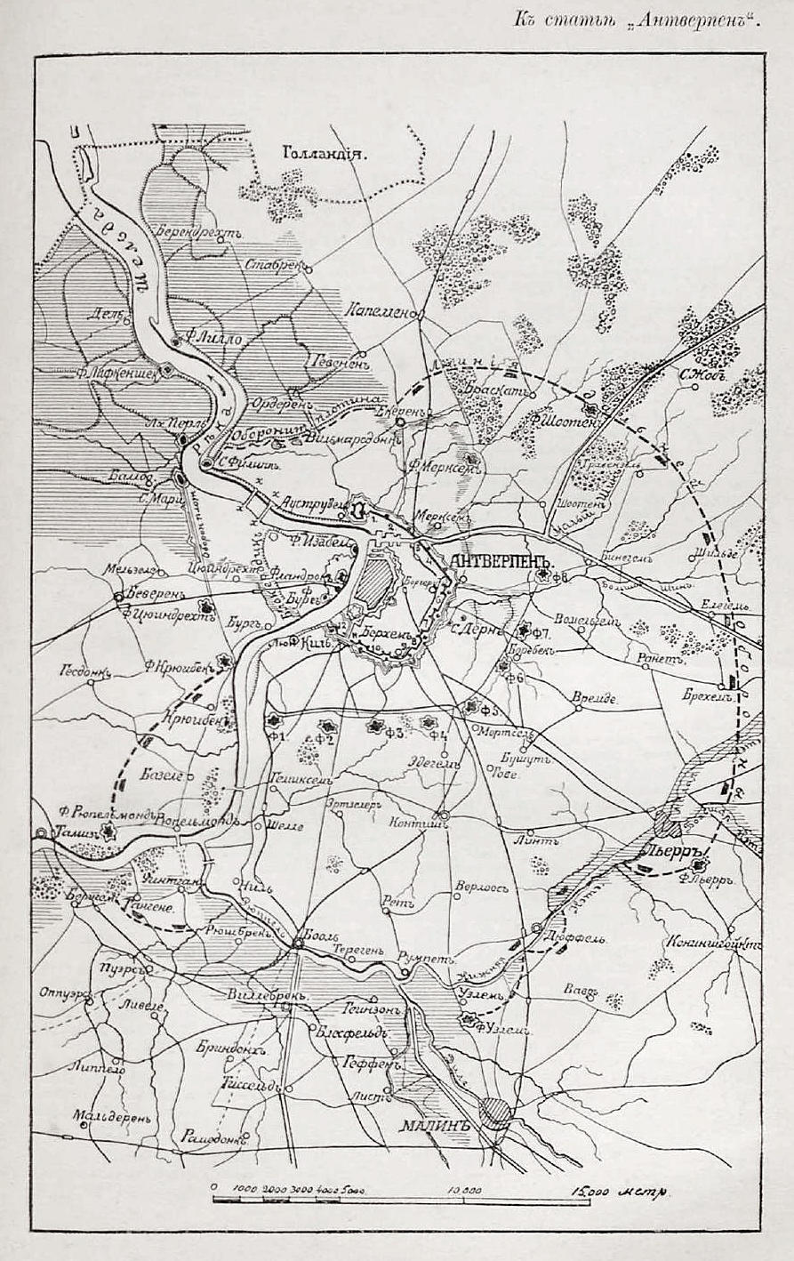 Данное изображение было использовано в статье «Антверпен» опубликованной во втором томе «Военной энциклопедии», который был издан книгоиздательским товариществом Ивана Дмитриевича Сытина в 1911 году в столице Российской империи городе Санкт-Петербурге.